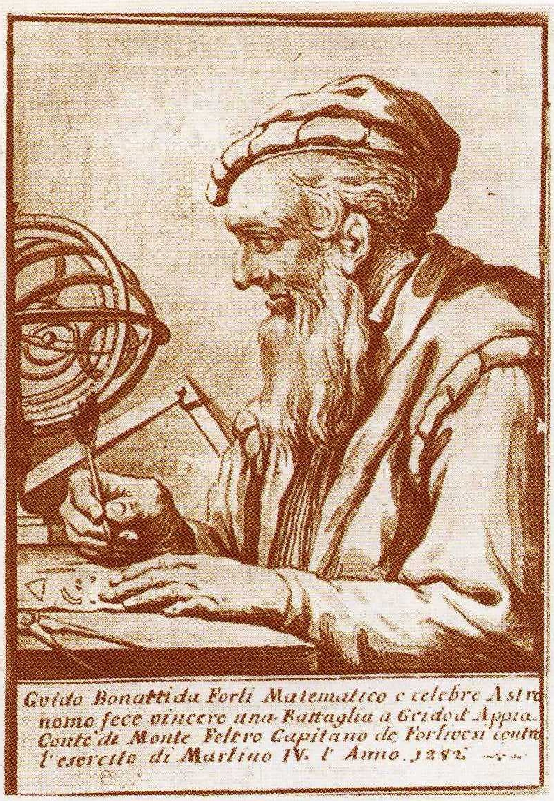 Guido Bonatti, anónimo del siglo XVIII